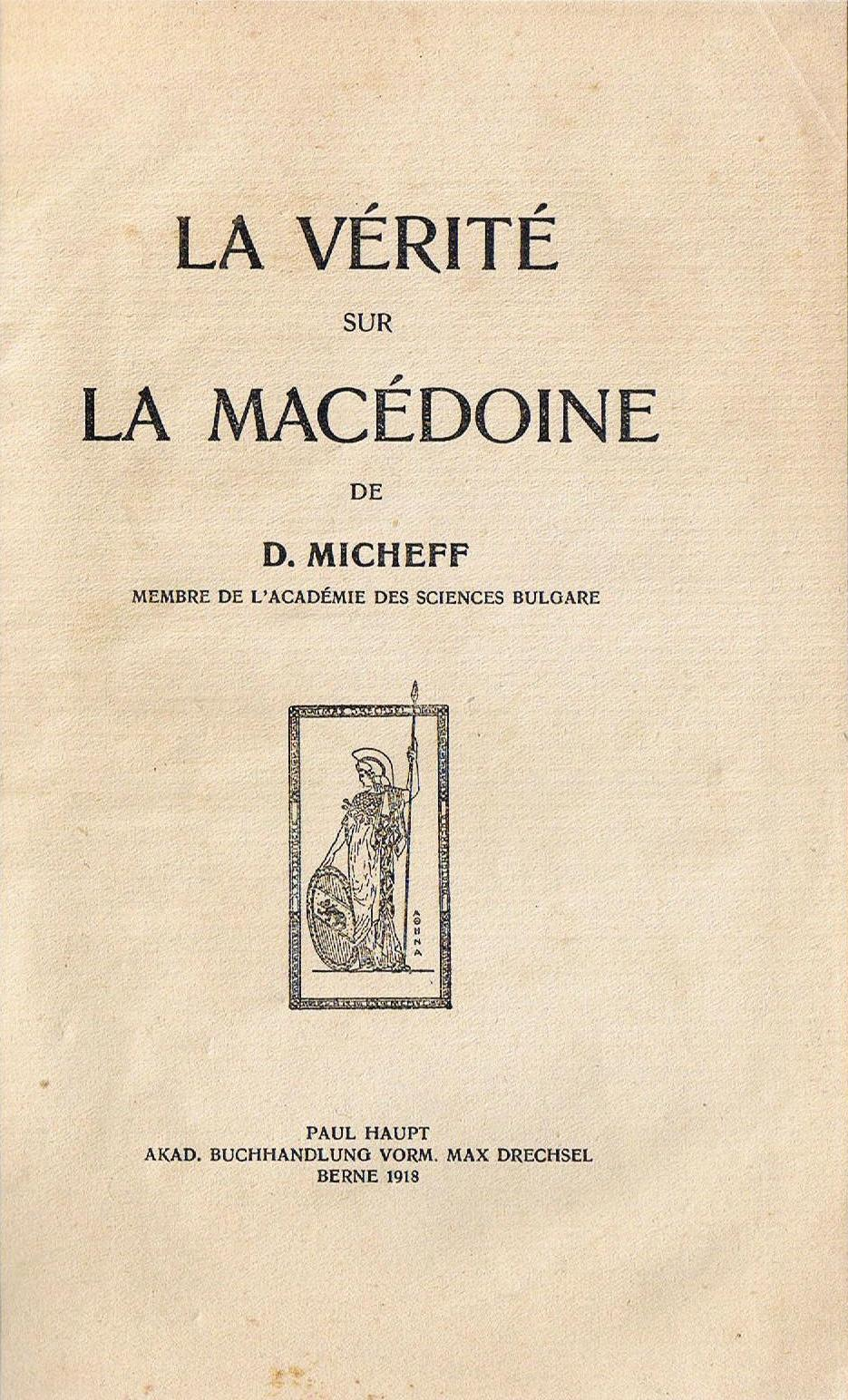 La Verite Sur La Macedoine